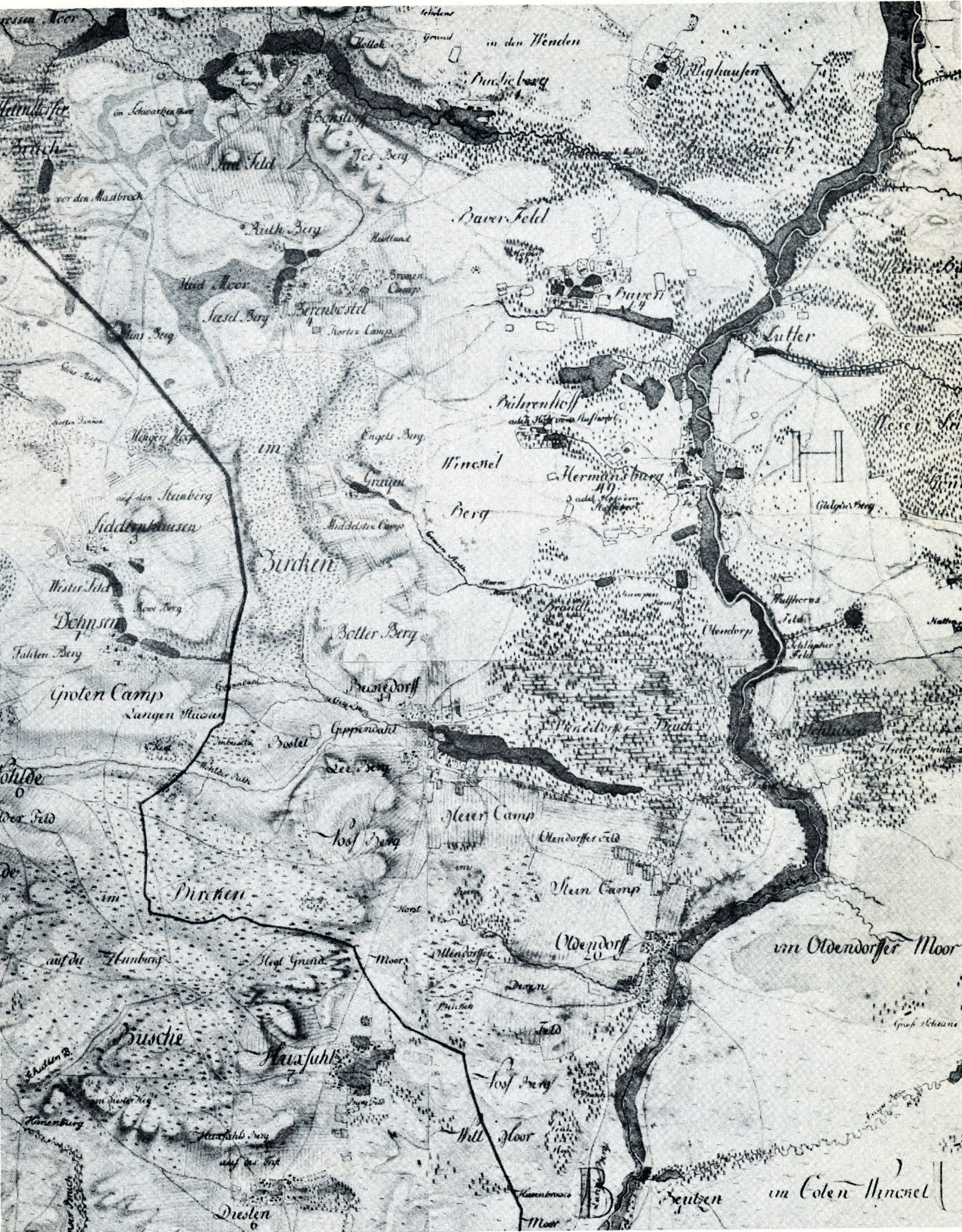 Kurhannoversche Karte von Hermannsburg und Oldendorf, Niedersachsen, Germany